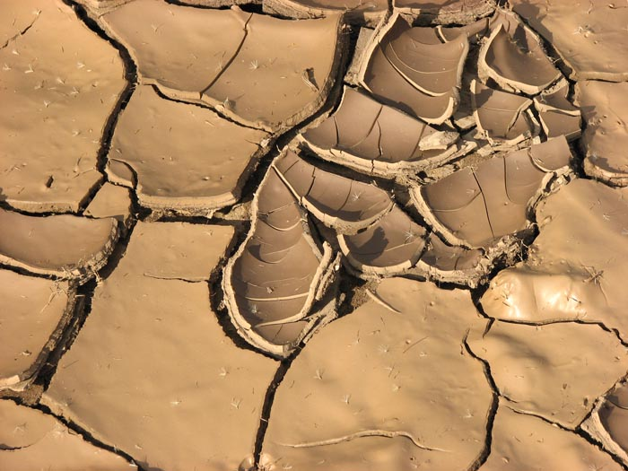 Dry mud, Israel